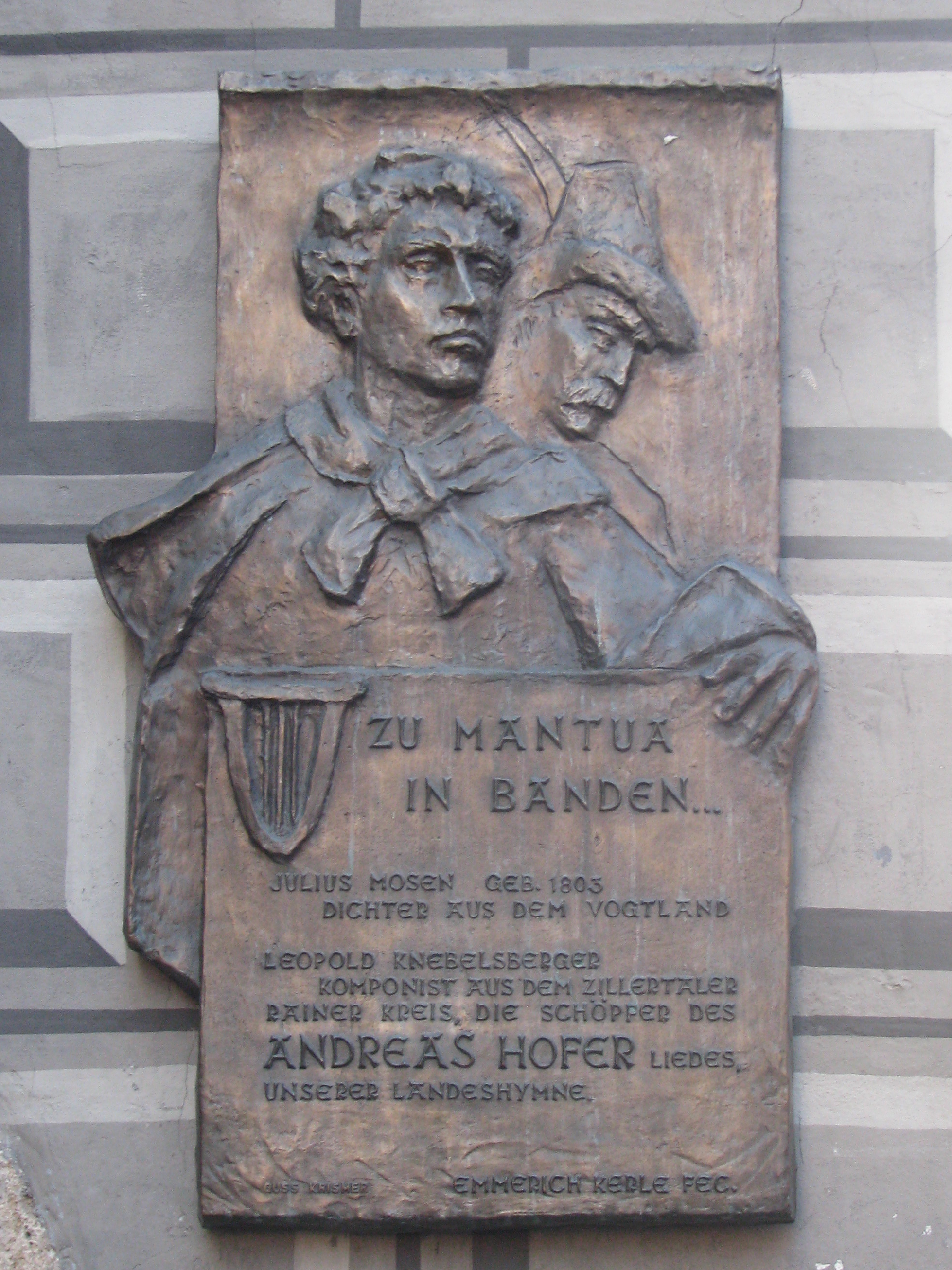 Gedenktafel für Julius Mosen und Leopold Knebelsberger, Schöpfer des Andreas-Hofer-Liedes, am Gasthof Goldener Adler in Innsbruck; geschaffen von Emmerich Kerle